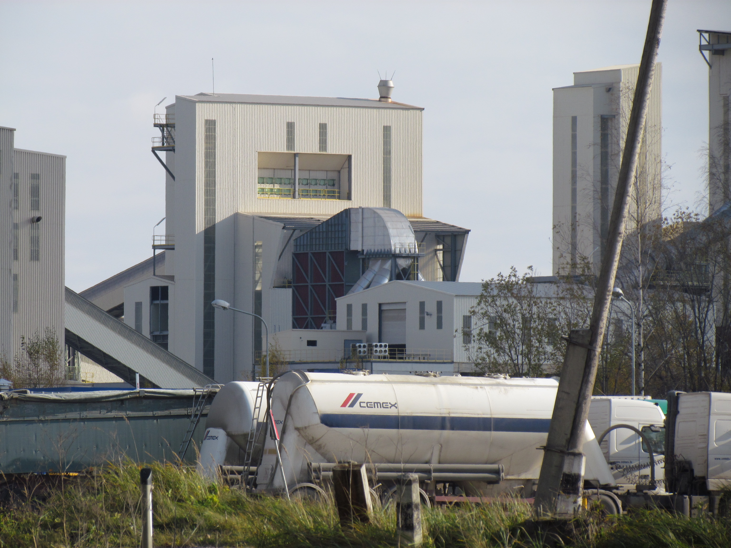 Cemex